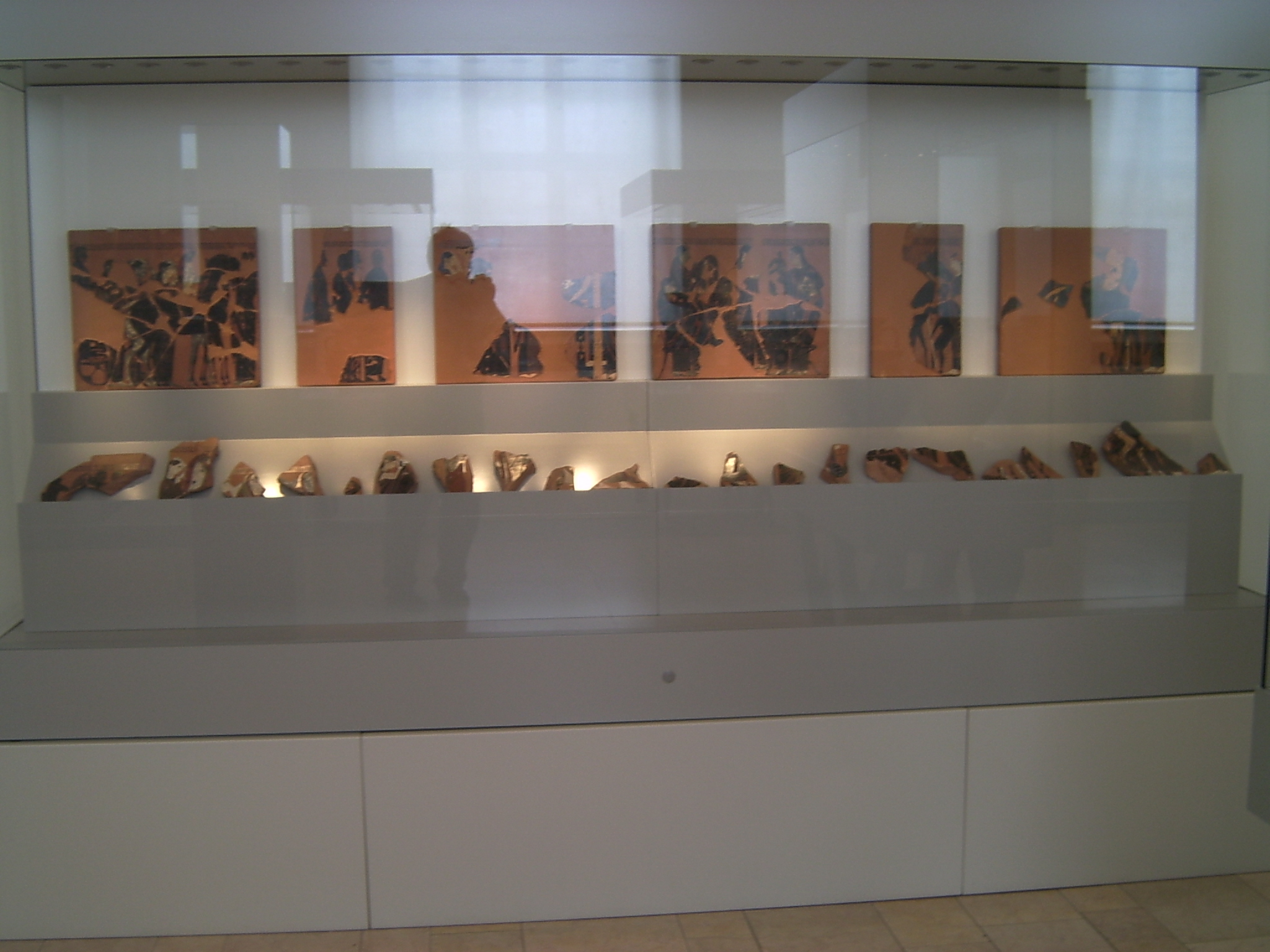 Grabpinakesfragmente des Vasenmalers Exekias, eine von 16 im schwarzfigurigen Stil bemalte Tontafeln, eine Prothesis (Totenklage) und einen Totenzug darstellend, gefunden auf dem Kerameikos in Athen, zwischen 540 und 530 v. Chr., 43 × 37 cm, Antikensammlung Berlin